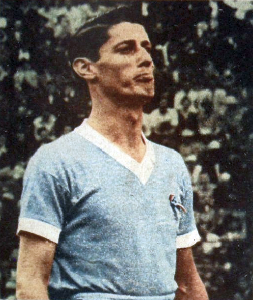 Juan Alberto Schiaffino, el cerebro del equipo Uruguayo en el ataque, sería figura tanto en la Copa del Mundo de 1950 como en la de Suiza 1954. A los 66 minutos de juego en la final ante Brasil, marcó el gol del empate en el Maracaná tras rematar de primera contra la portería de Moacir Barbosa